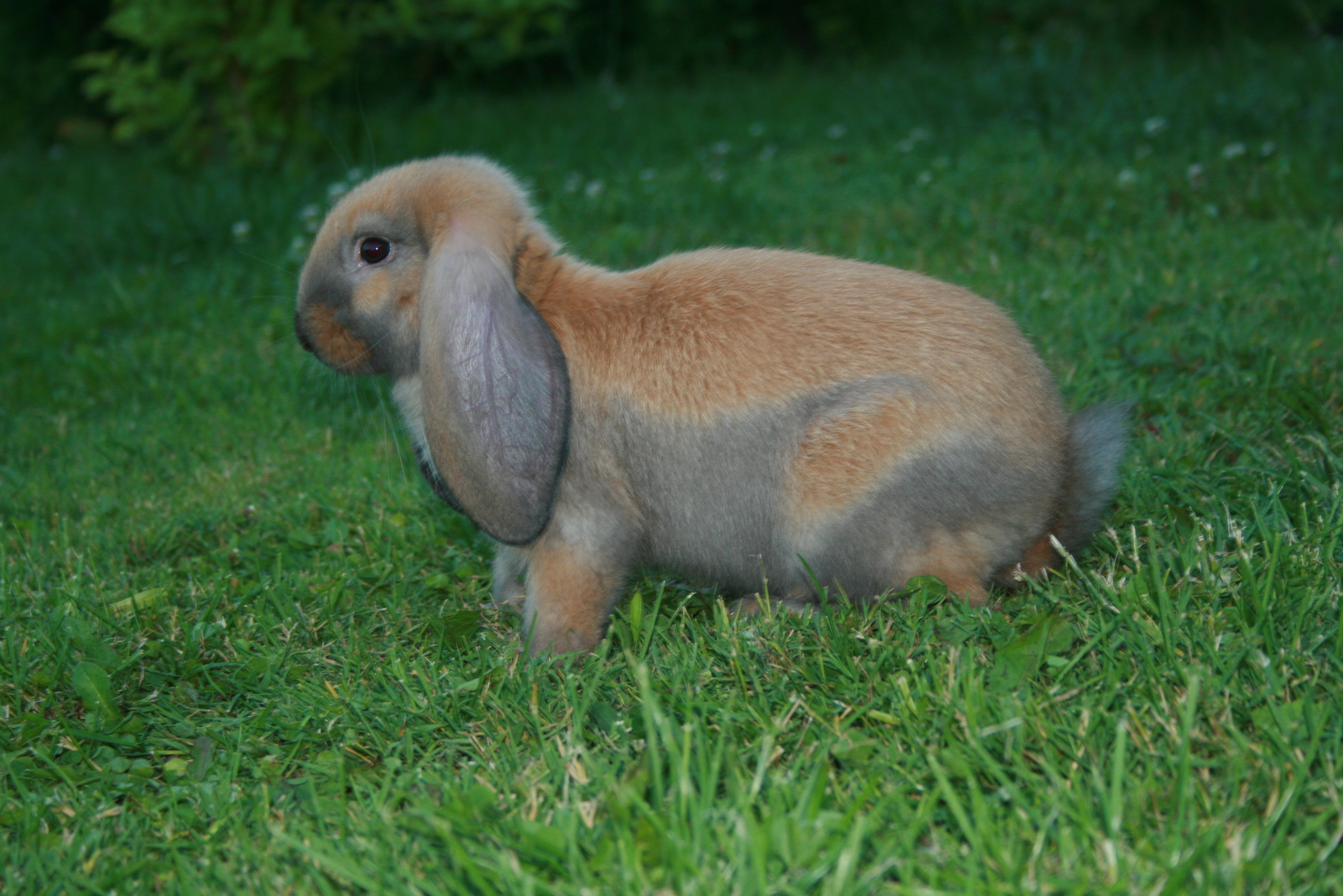 Młody Francuski Baran Madagaskarowy z typowo ukształtowanym "płaszczem"